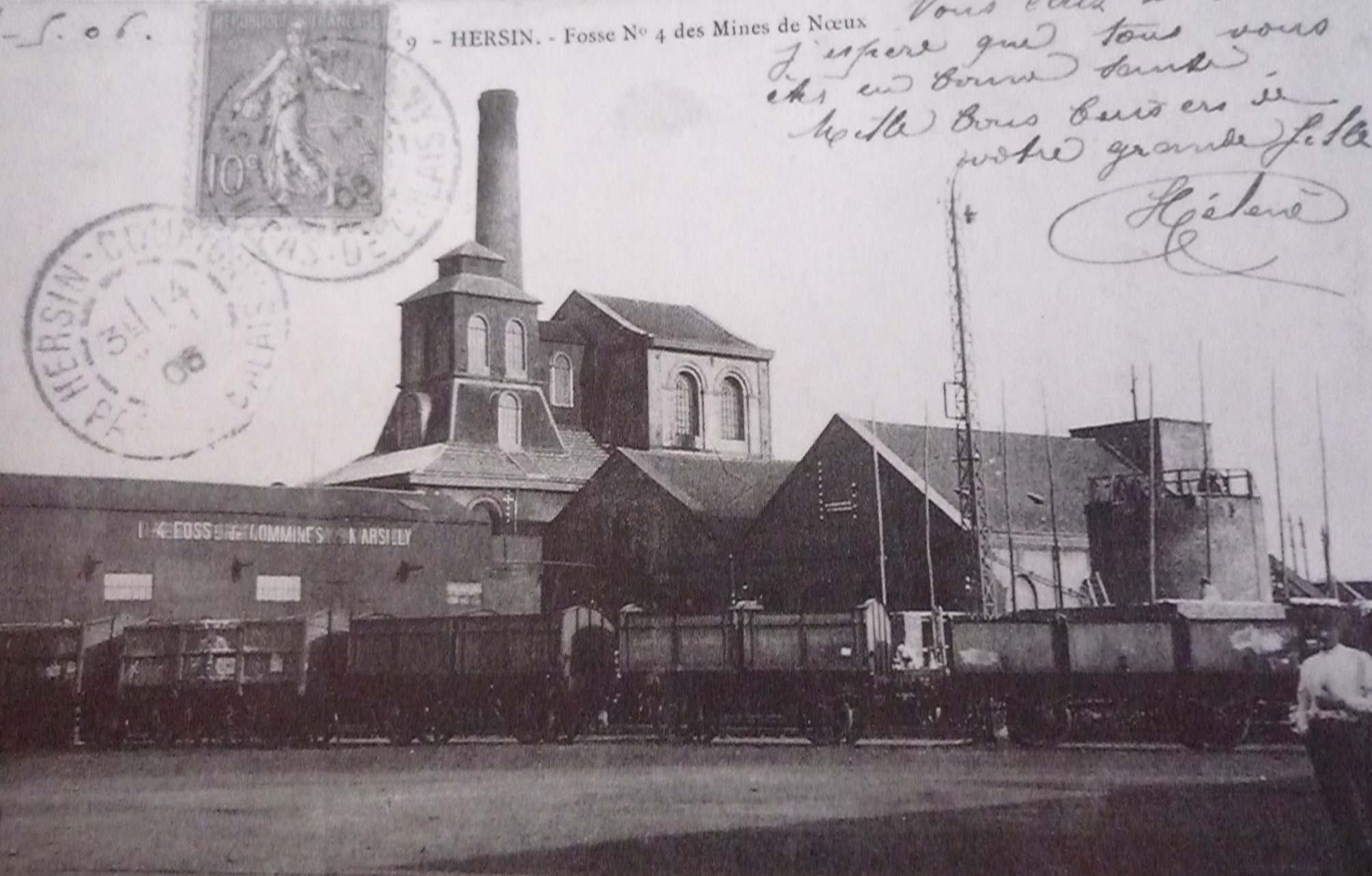 La Fosse n° 4 - 4 bis de la Compagnie des mines de Nœux était un charbonnage constitué de deux puits situé à Hersin-Coupigny, Pas-de-Calais, Nord-Pas-de-Calais, France.